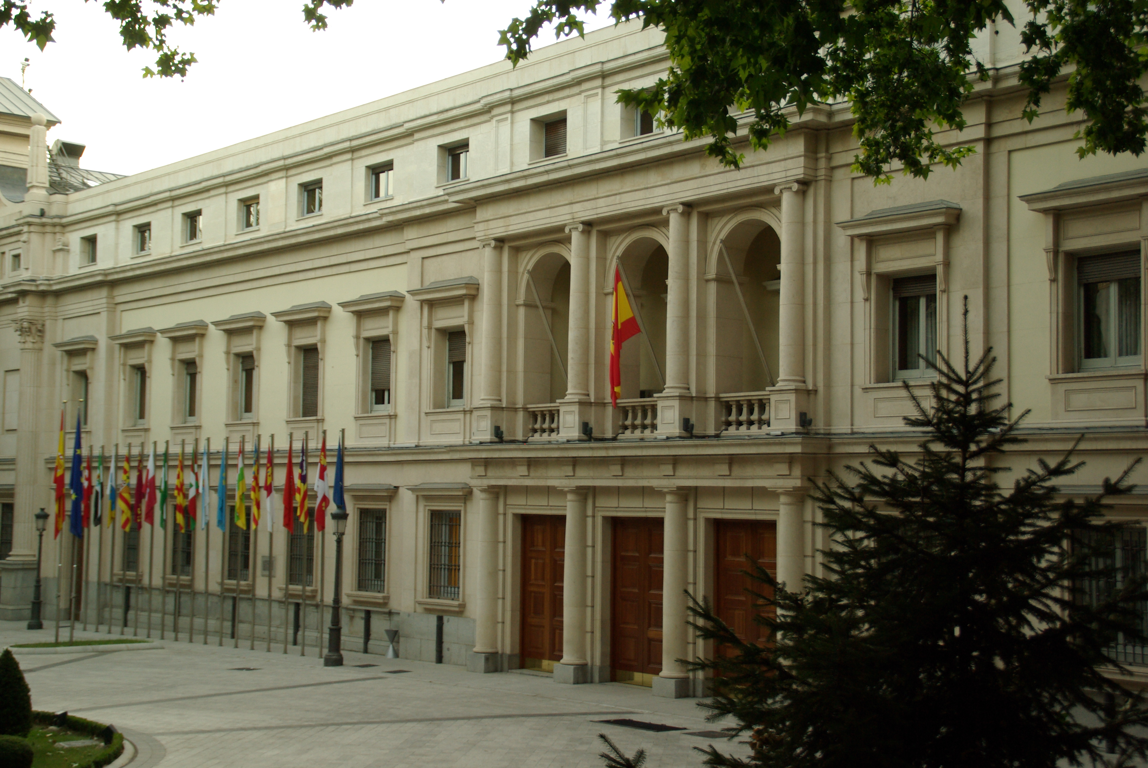 ® S.D. (ES,EN.) MADRID SENADO DE ESPAÑA